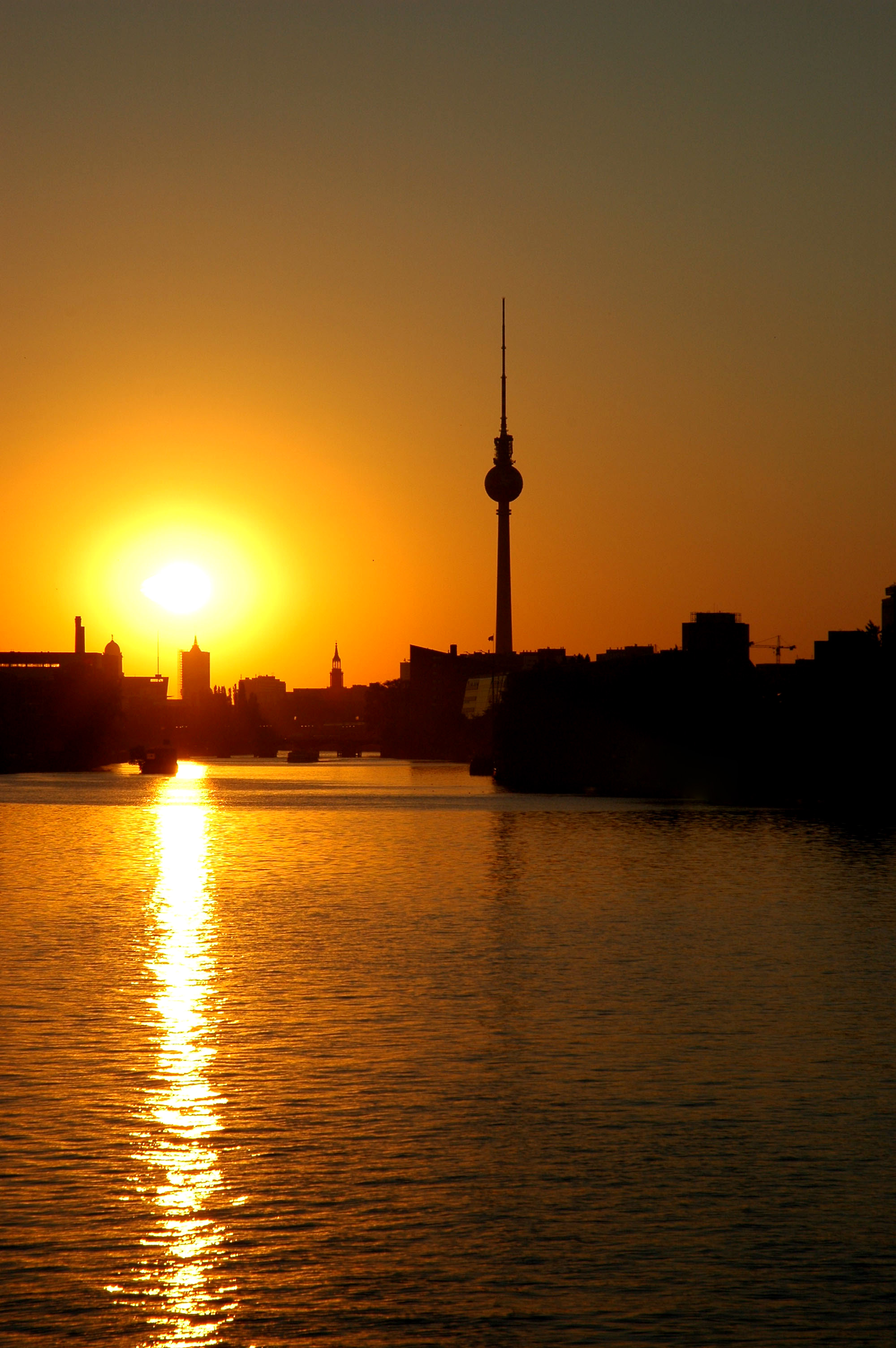 berliner fernsehturm sonnenuntergang